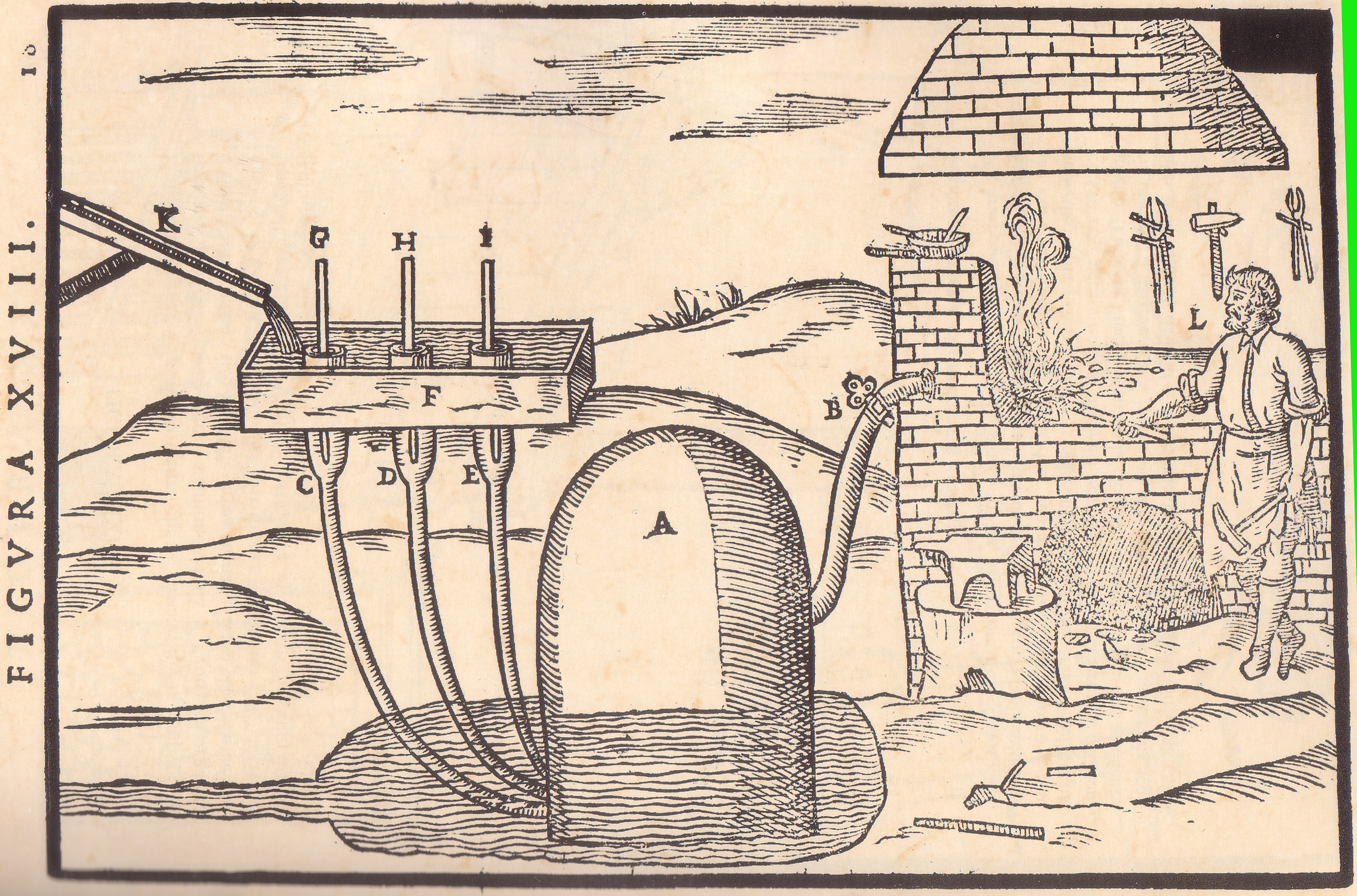 "Le Machine", descrizione e rappresentazione di macchine mosse dal vento, dall'acqua, dal vapore, da gravi, da uomini e animali